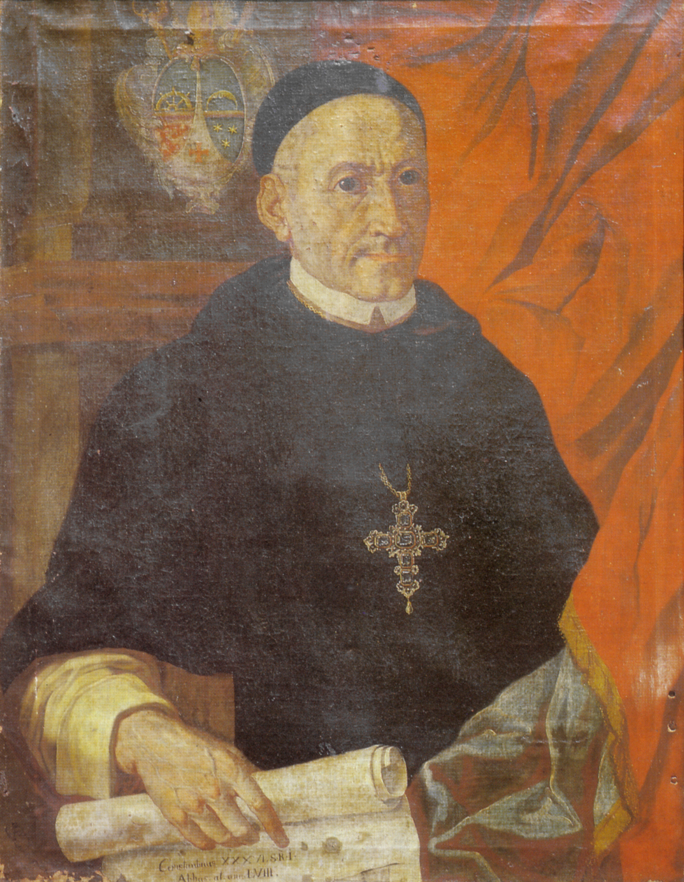 Constantin Miller, Abt des Klosters Salem (1725–1745)